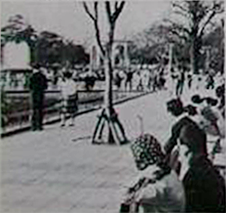 日比谷公園